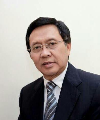 Prof. Suyanto, Ph.D., guru besar Fakultas Ekonomi Universitas Negeri Yogyakarta, mantan Dirjen Mandikdasmen Kementerian Pendidikan dan Kebudayaan Republik Indonesia.